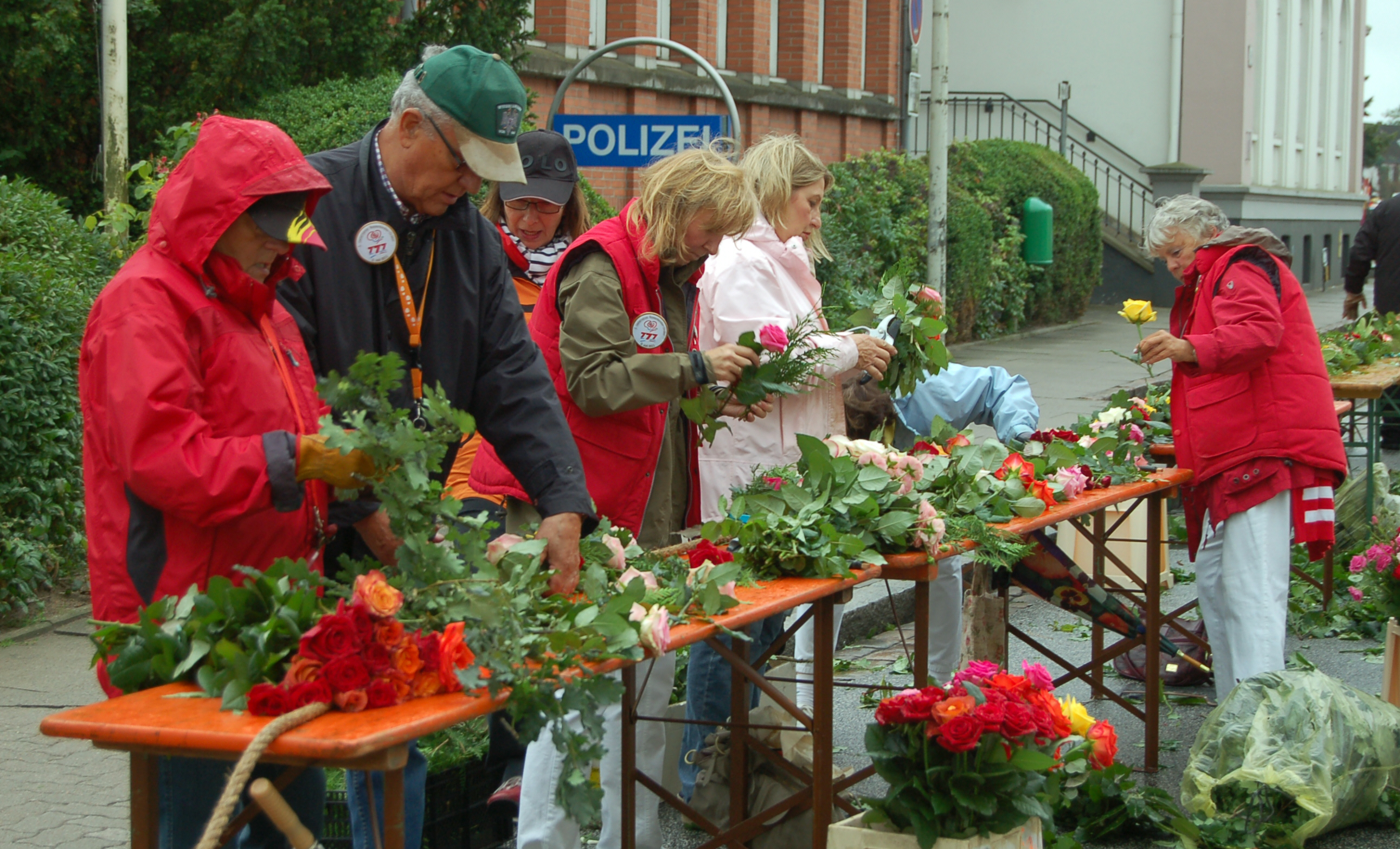 Binden der längsten Rosengirlande Europas (320 m) bei der 777 Jahr Feier der Stadt Uetersen.